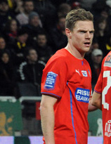 Arnór Smárason